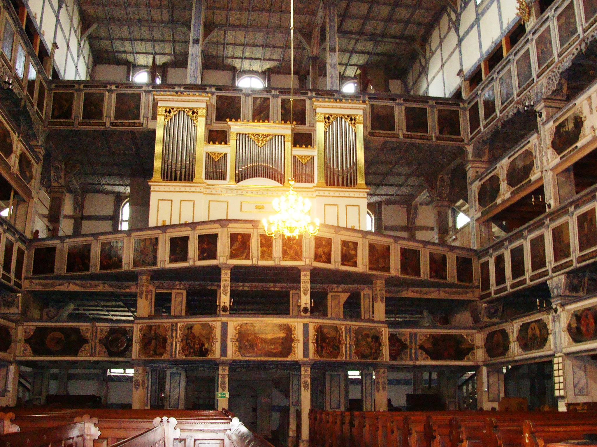 Jawor, kościół ewangelicki (Pokoju), 1654-1656, 1709